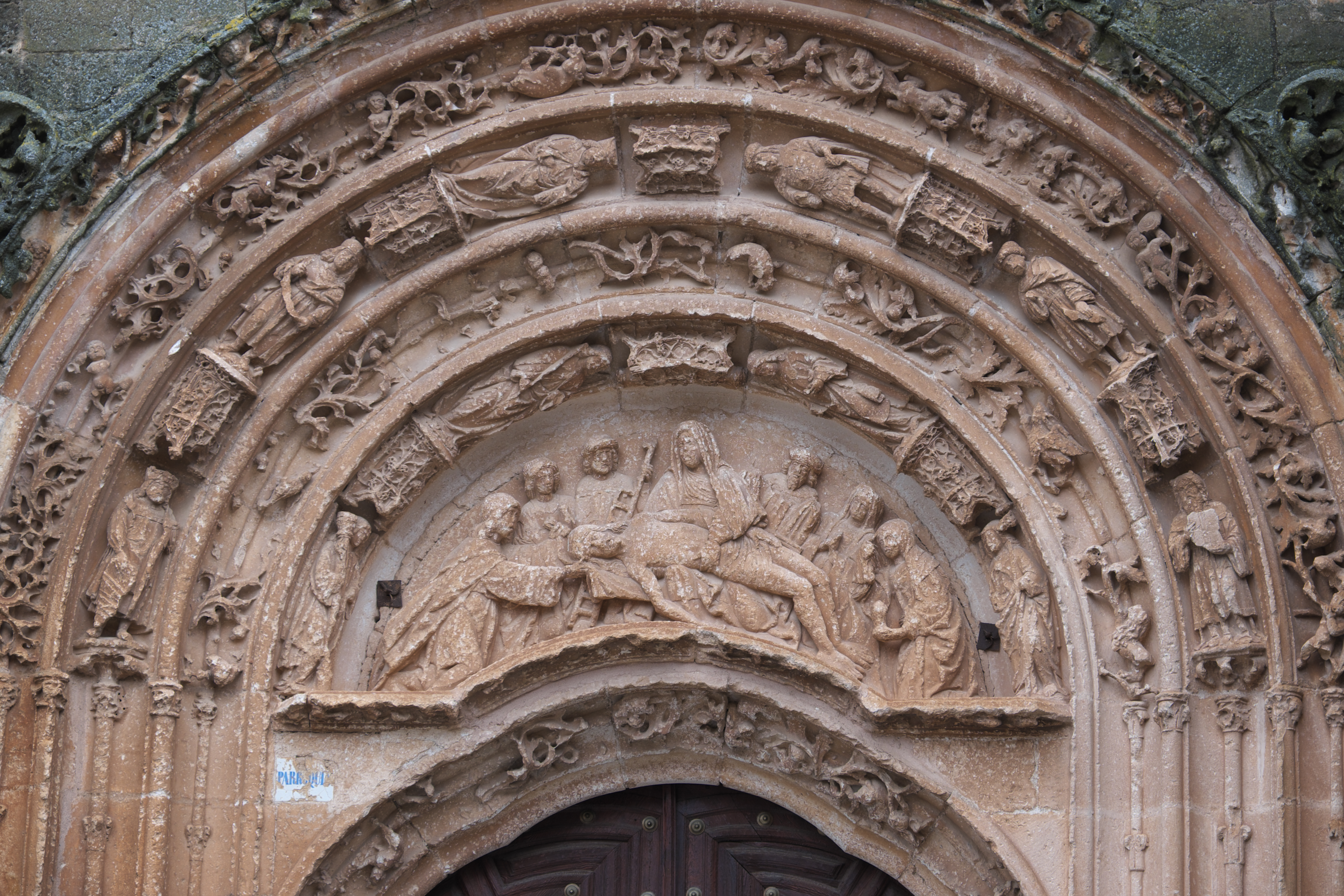 Katholische Pfarrkirche Nuestra Señora de la Asunción in Villahoz in der Provinz Burgos (Kastilien-León/Spanien), Tympanon